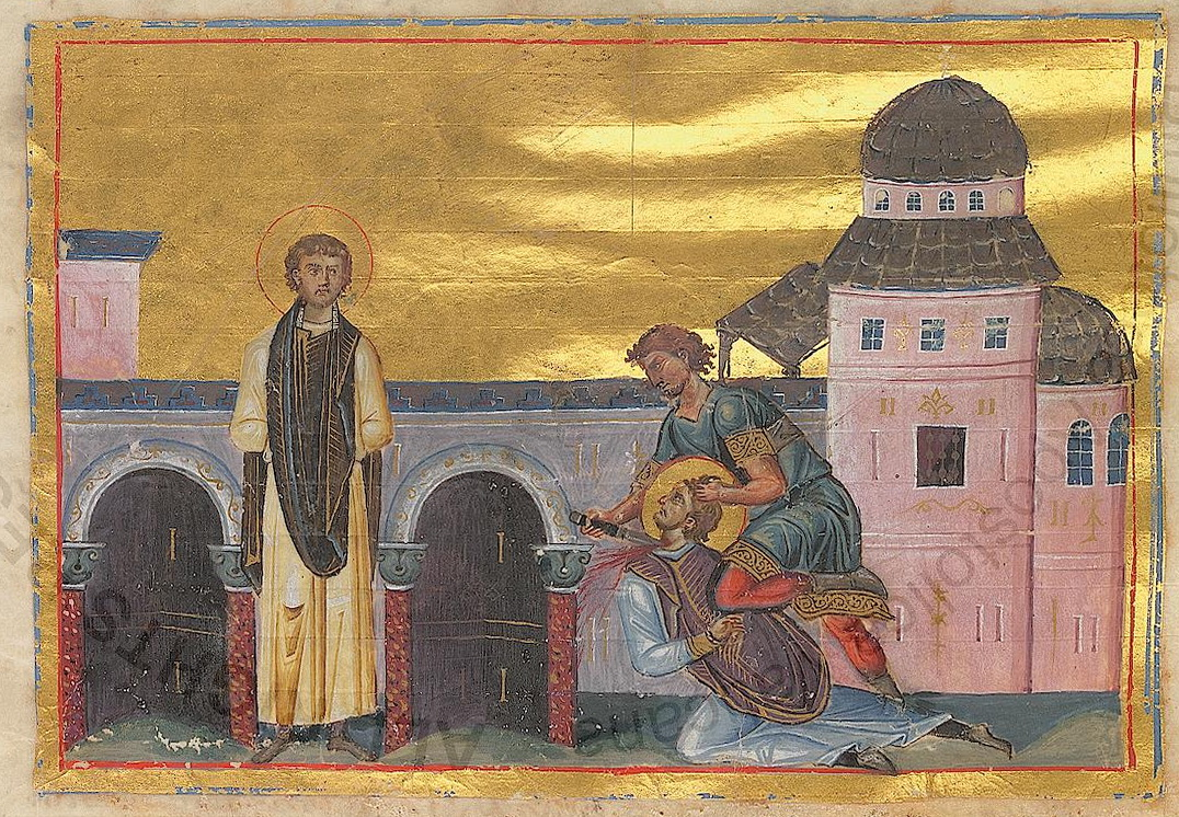 Святые мученики Маркиан и Мартирий Константинополь. 985 г. Миниатюра Минология Василия II. Ватиканская библиотека. Рим.